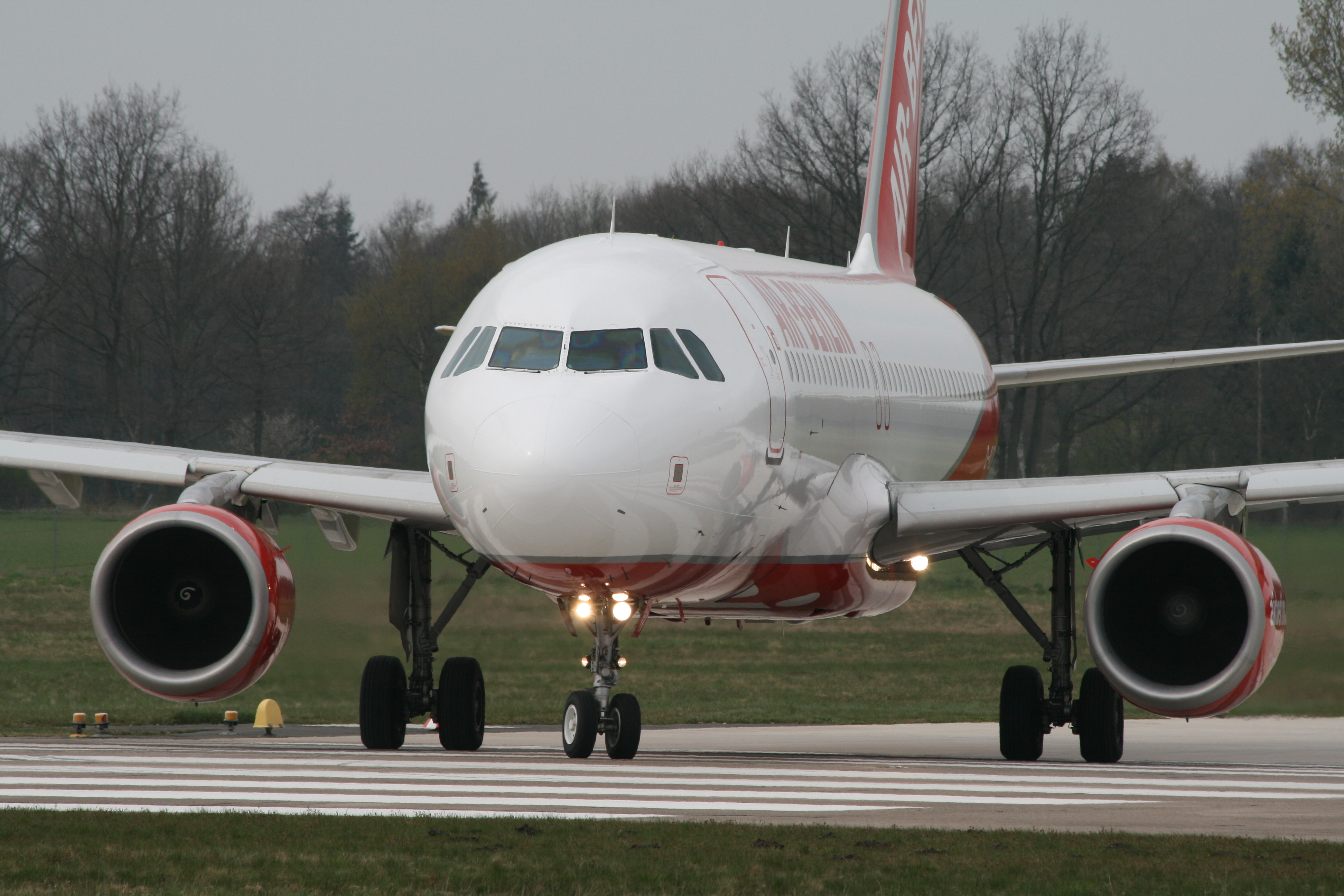 Haj/Eddv 09-04-08